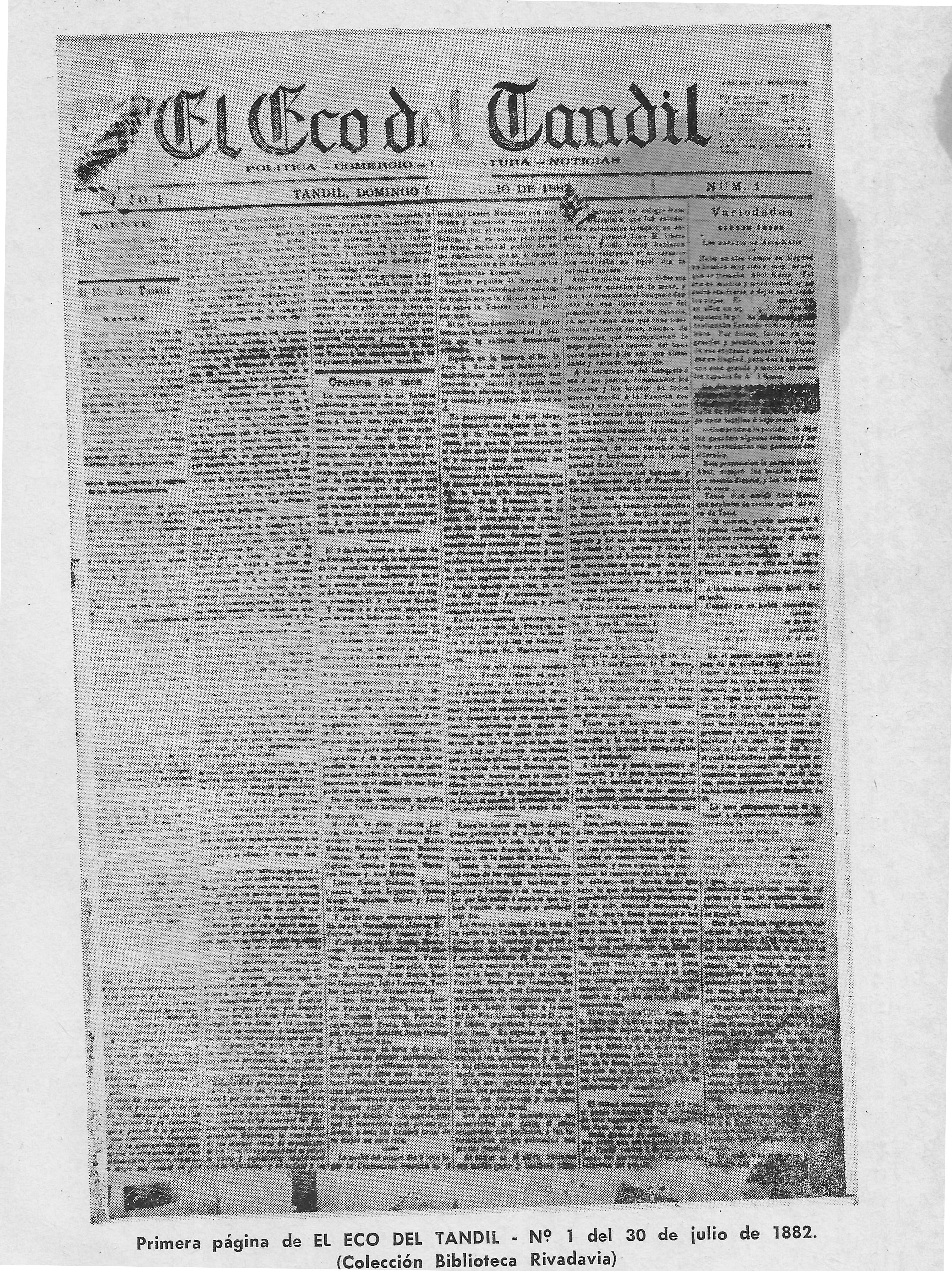 Primer tapa del diario El Eco del Tandil